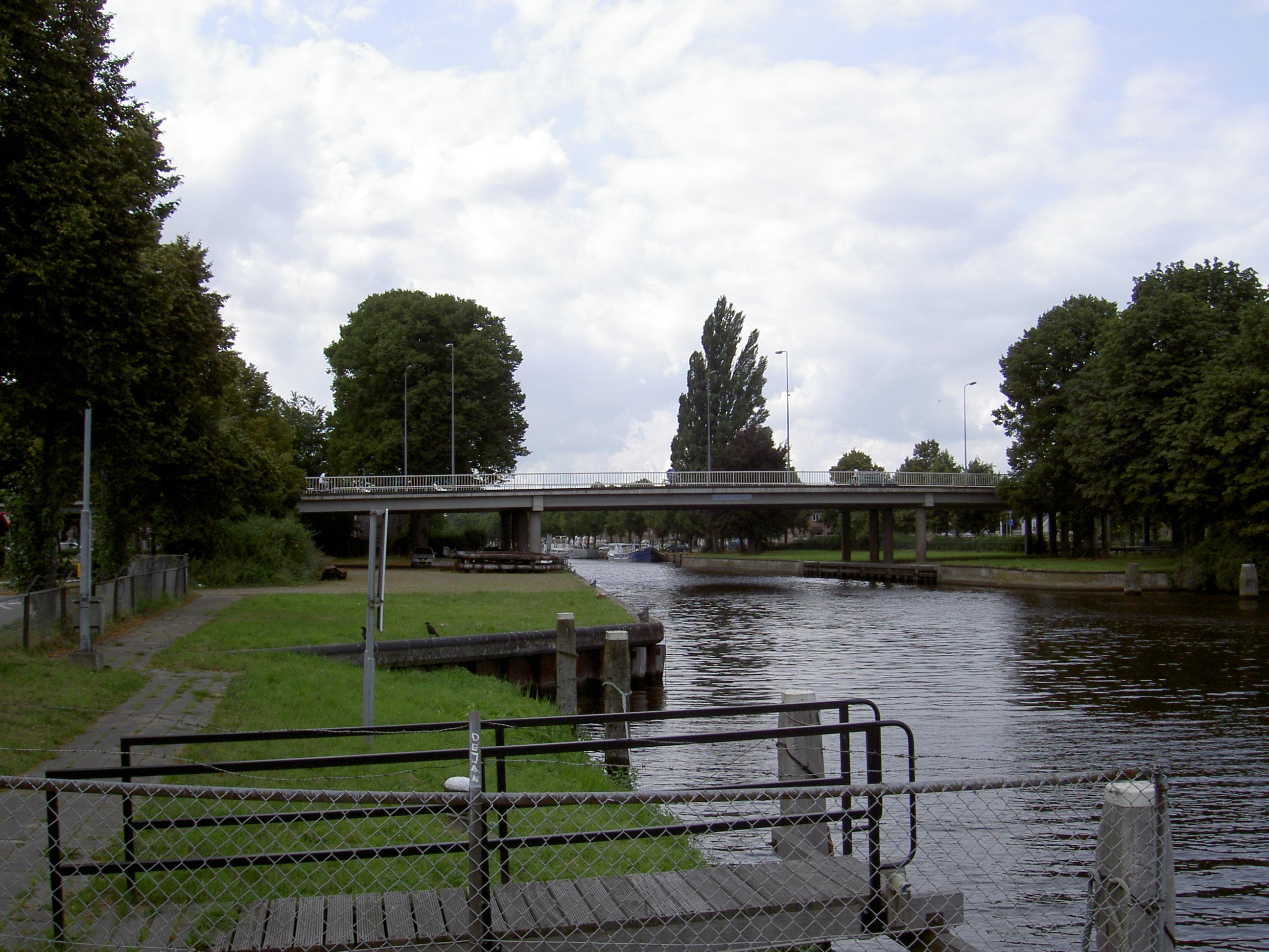 Burgemeester Lambooybrug, 's-Hertogenbosch